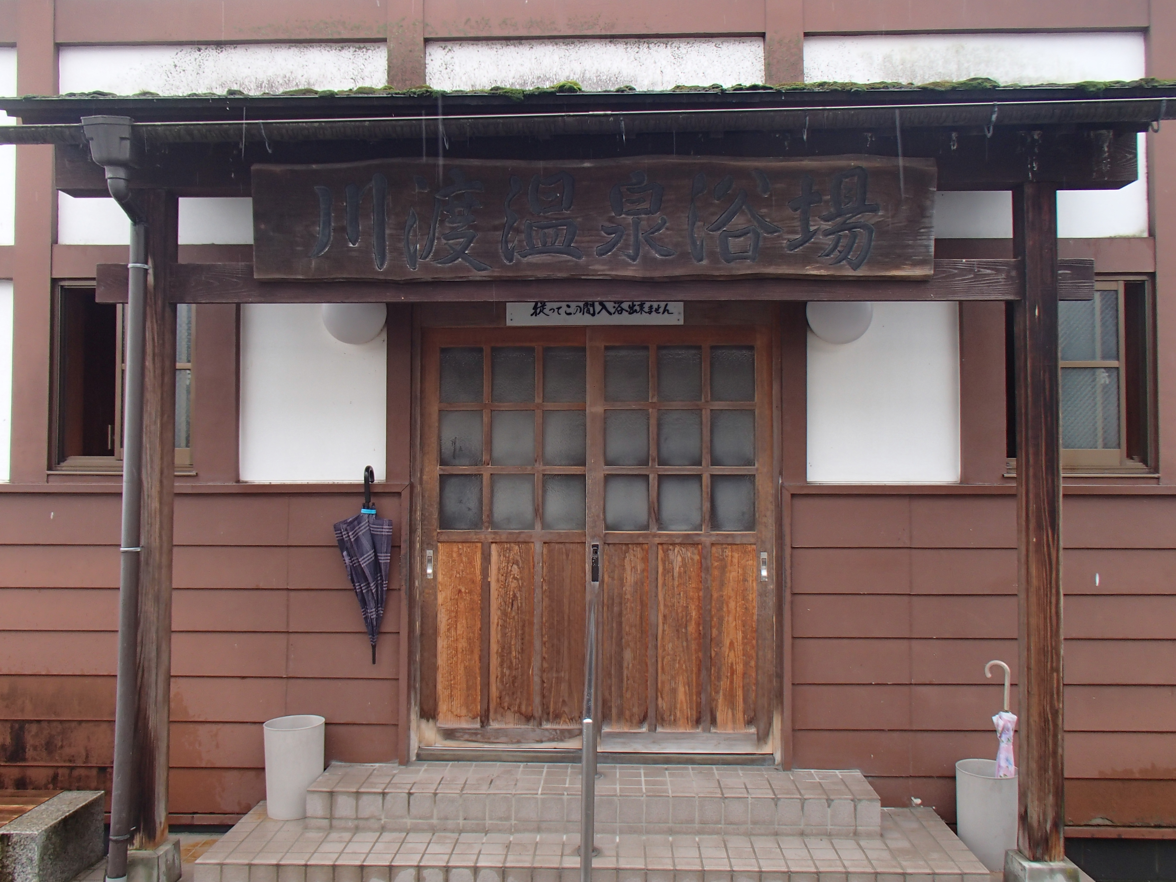 2018/08/16 takasaki001が撮影